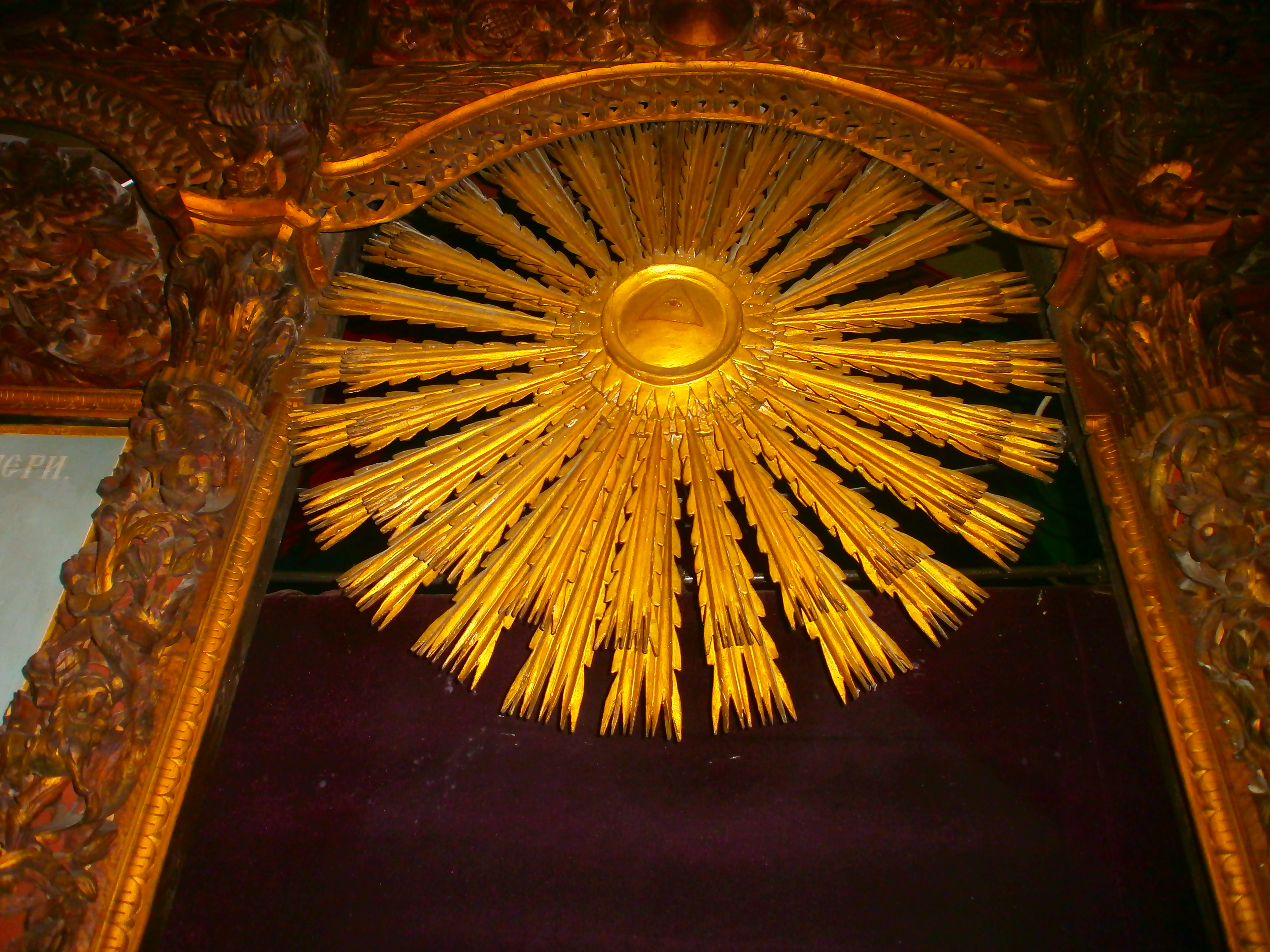 Srpski (latinica): Dimitrovgrad